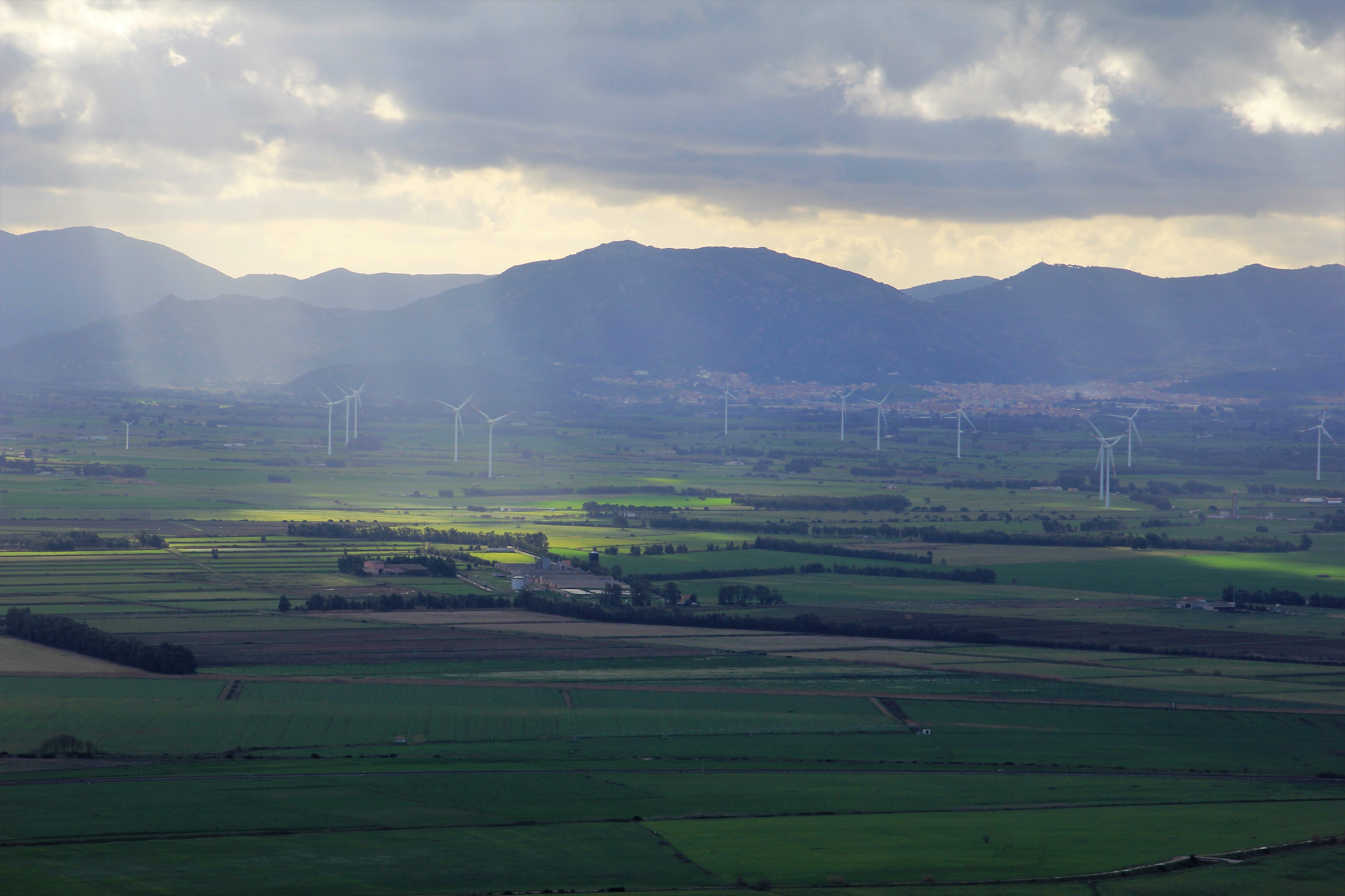 Parco eolico del Medio Campidano